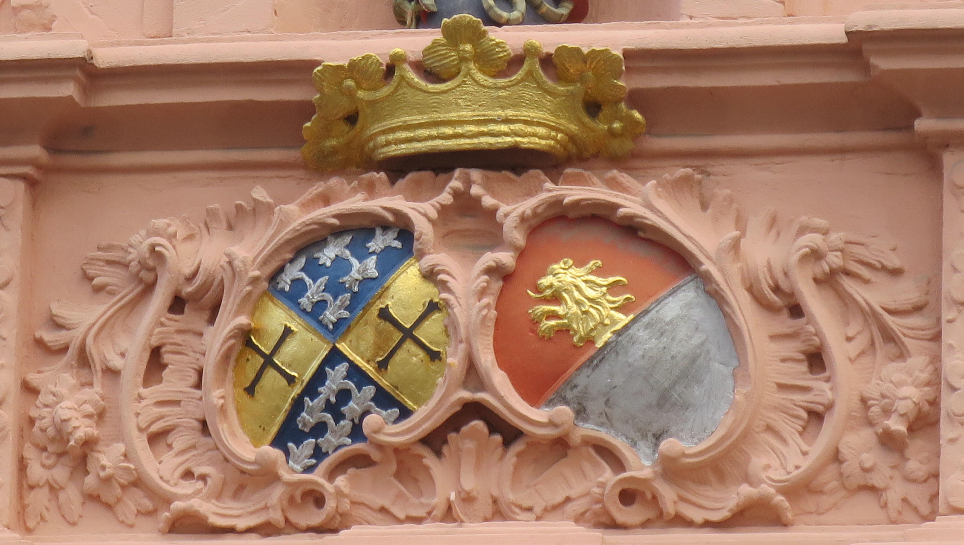 Detail aus der Fassade des röm.-kath. Pfarrhauses in Worms-Herrnsheim, Hauptstraße 18, Kulturdenkmal: Allianzwappen des Franz Heinrich von Dalberg (heraldisch: rechts) und seiner Frau, Maria Sophie Anna von Eltz-Kempenich (heraldisch: links)